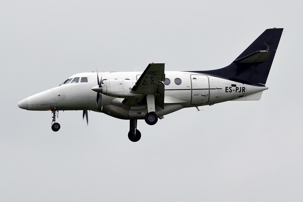 Avies, ES-PJR, BAe Jetstream 32